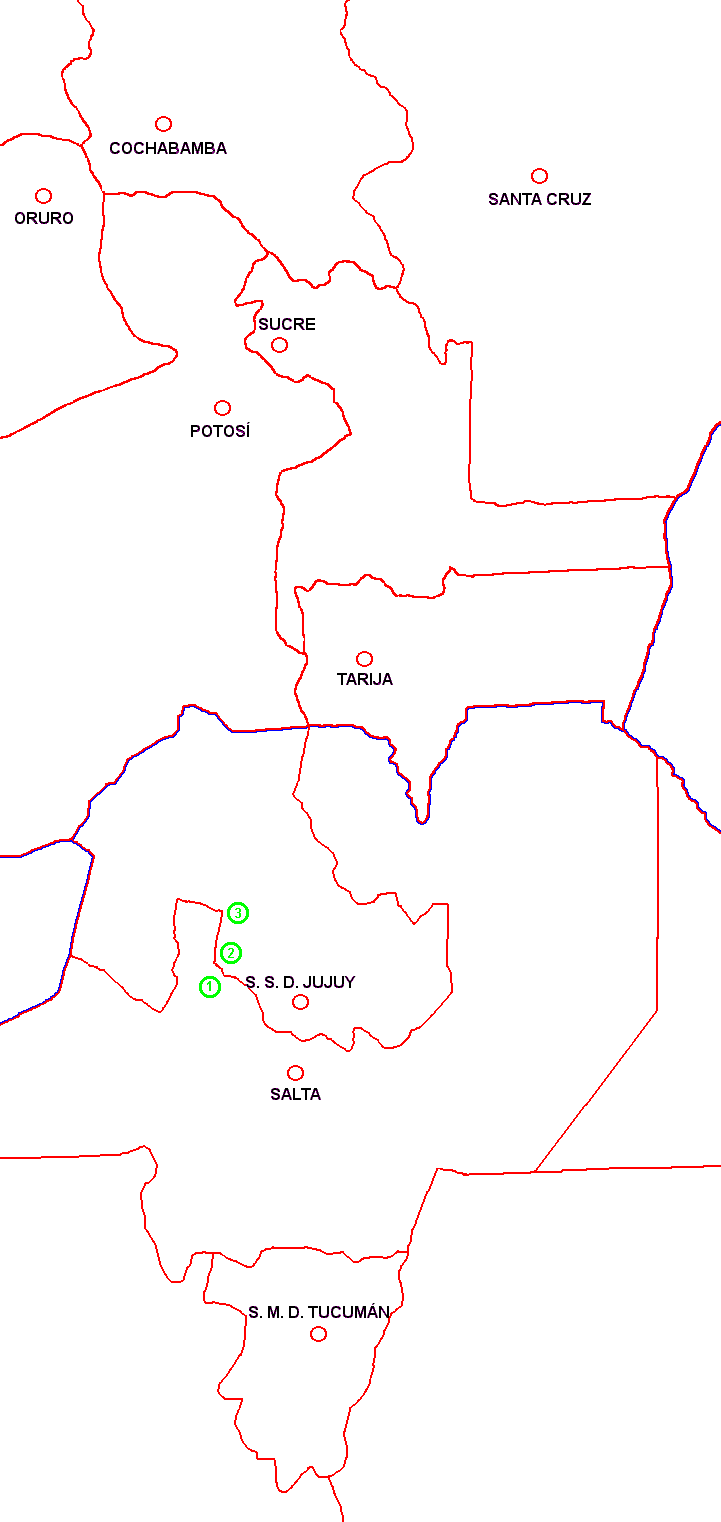 Rebutia einsteinii - range map